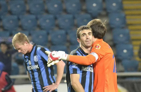 Петро Ковальчук під час матчу одеського Чорноморця з сімферопольською Таврією, 23 березня 2014 року.